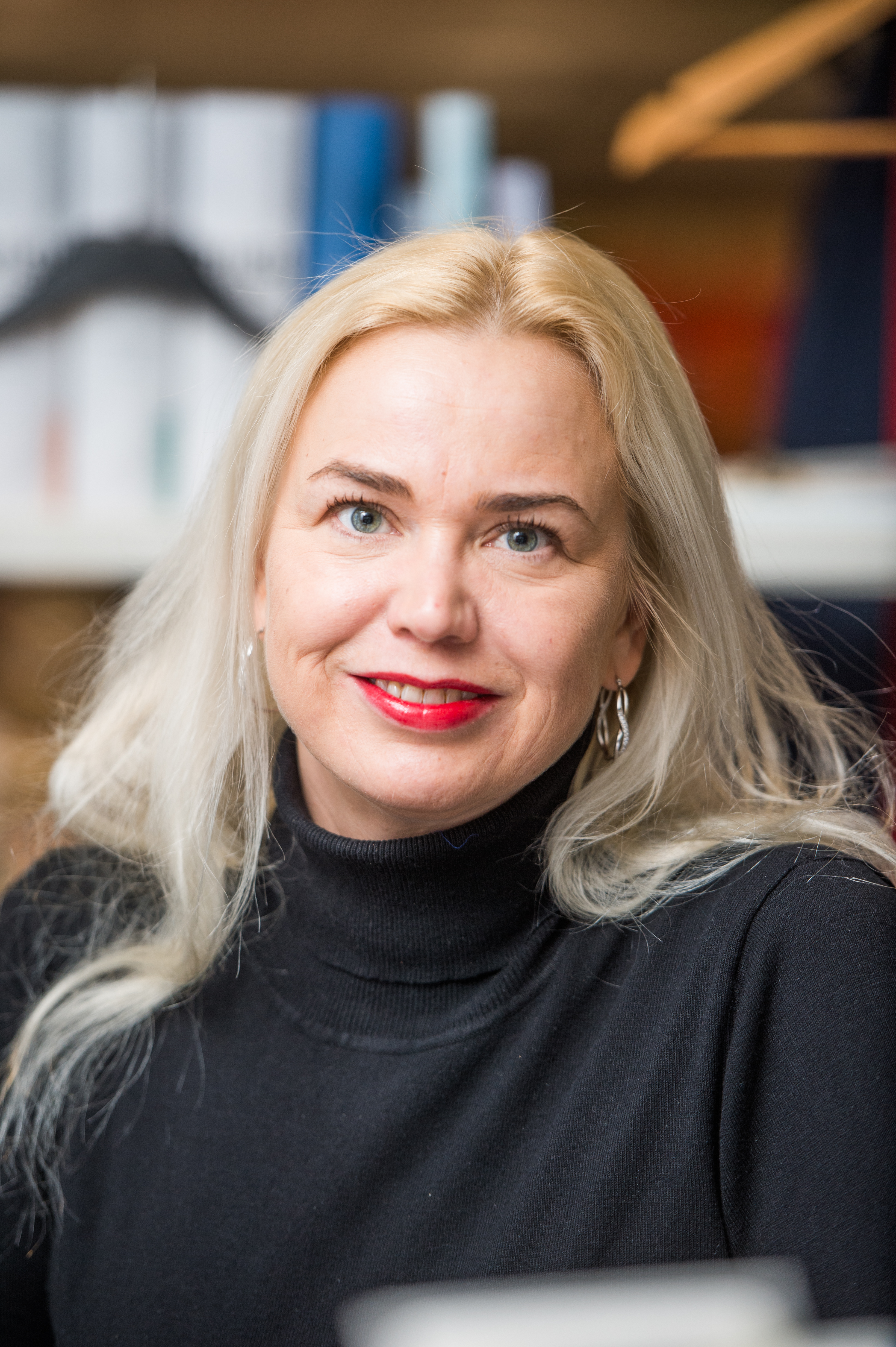 Kärt Anvelt